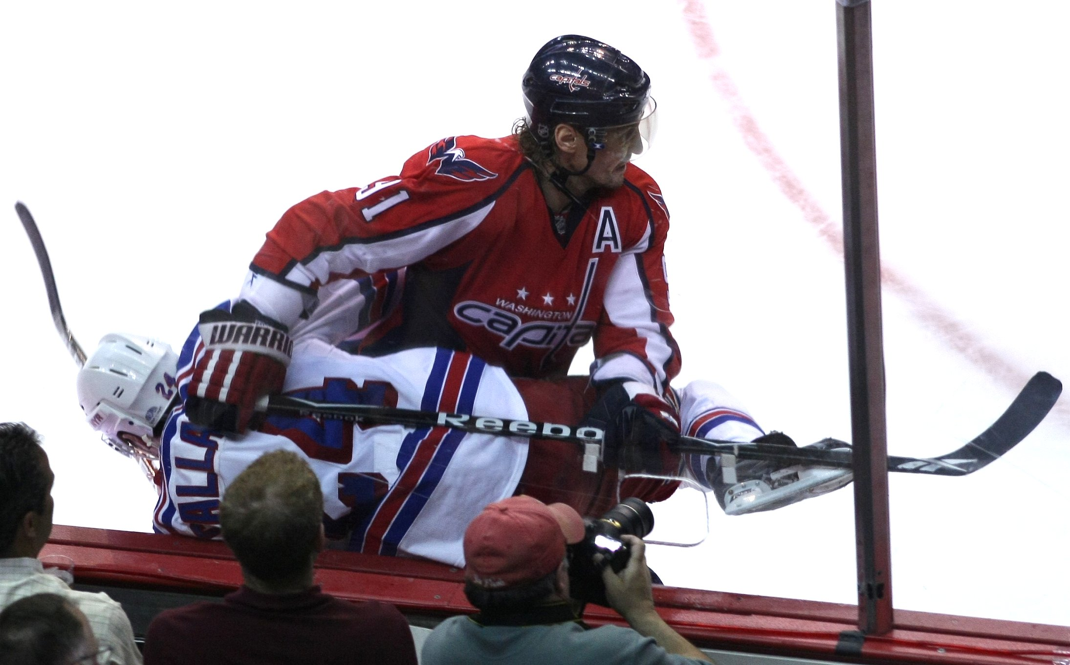 91 Sergei Fedorov